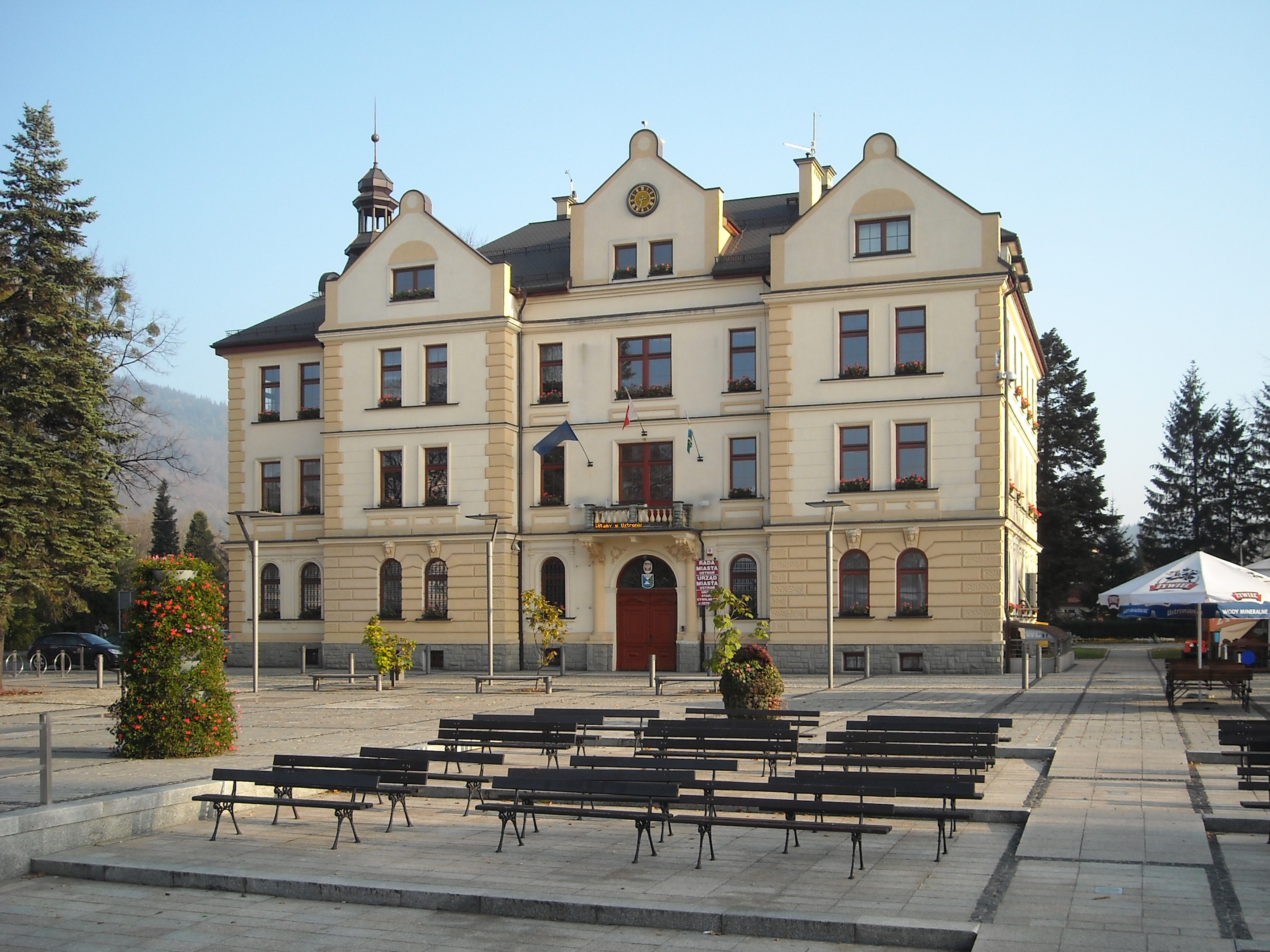 Urząd Miejski w Ustroniu